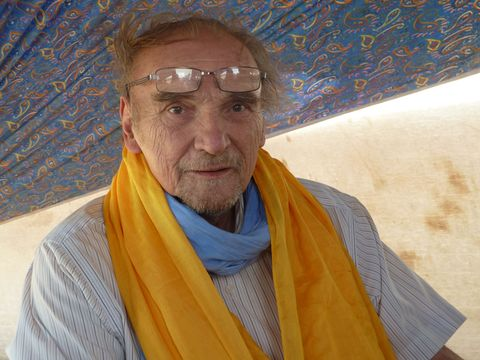 Maurice Freund à Oualata